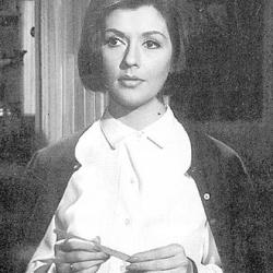 fotografía de la actriz argentina Susana Campos